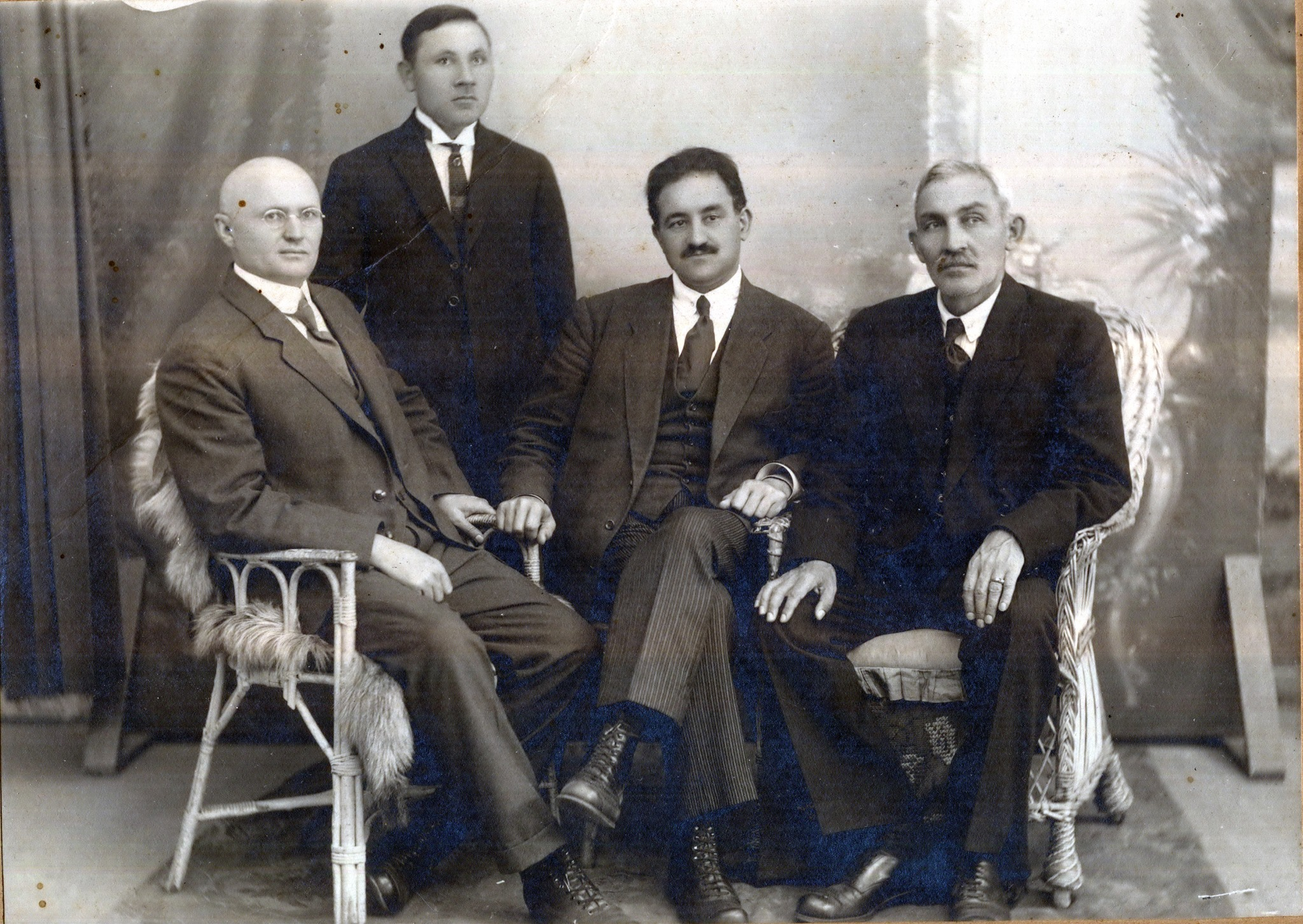 Məhəmməd Əmin Rəsulzadə və dostları. Hyvinkaa, Finlandiya